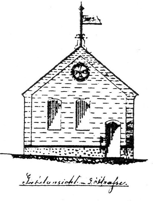 Pläne der Synagoge in Sörgenloch, erstellt 1893 von Heinrich Raab aus Nieder-Olm